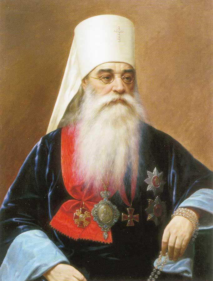 Флавиан Городецкий, митрополит Киевский и Галицкий, священноархимандрит Киево-Печерской лавры.